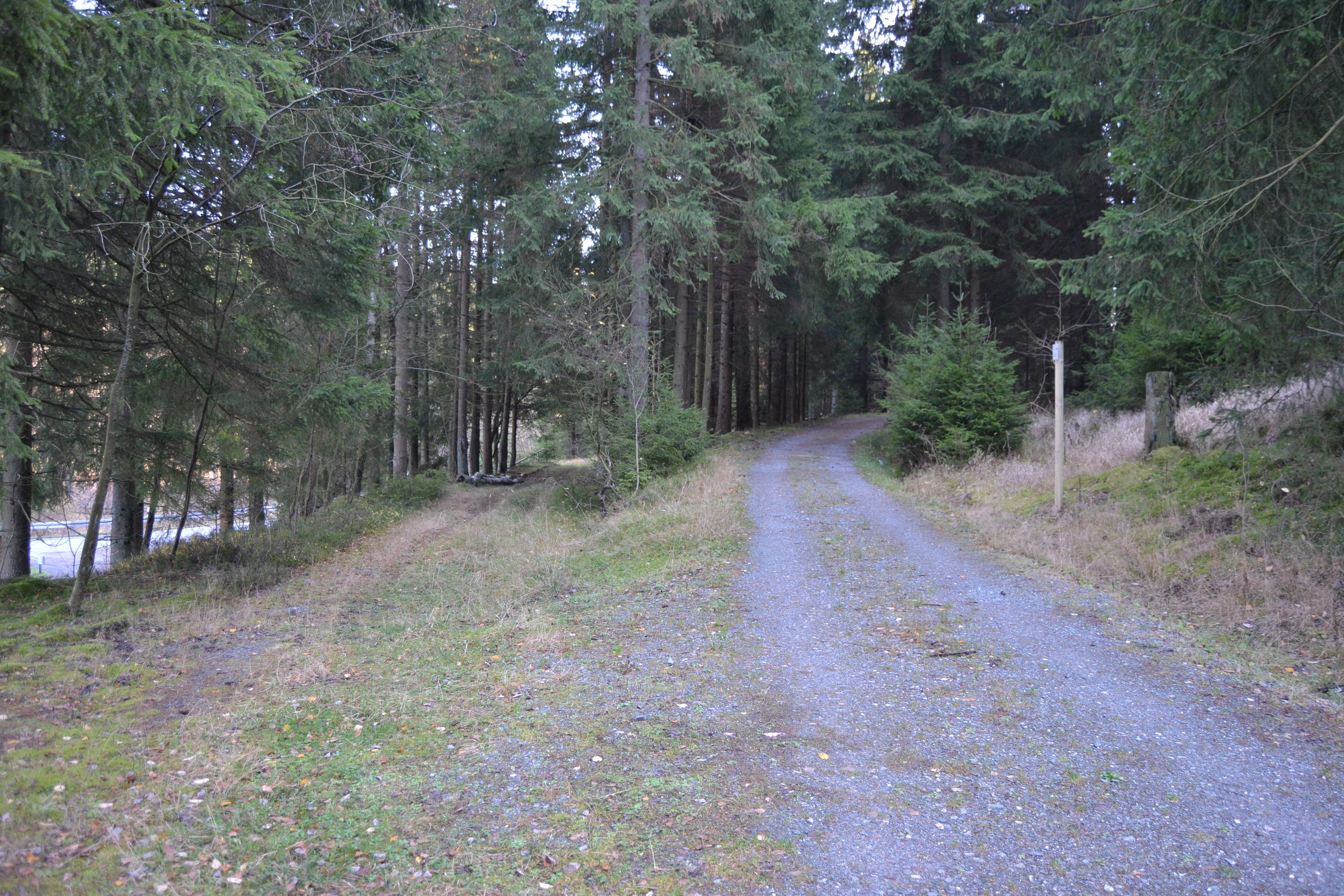 Ehemalige Streckenverzweigung der Südharz-Eisenbahn-Gesellschaft am östlichen Ausgang des Bahnhofs Brunnenbachsmühle. Links führte die Strecke nach Tanne, rechts nach Walkenried. Auf letzterer Trasse verläuft heute der Südharz-Eisenbahn-Radwanderweg.